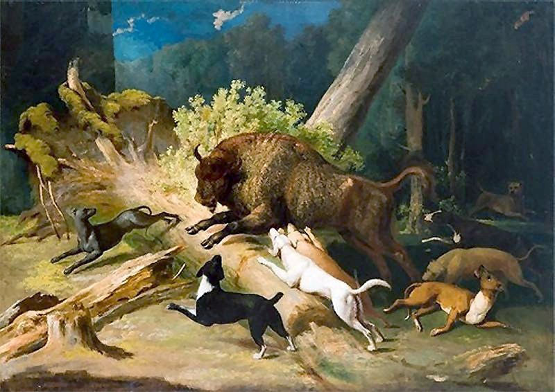 lit. Stumbro medžioklė